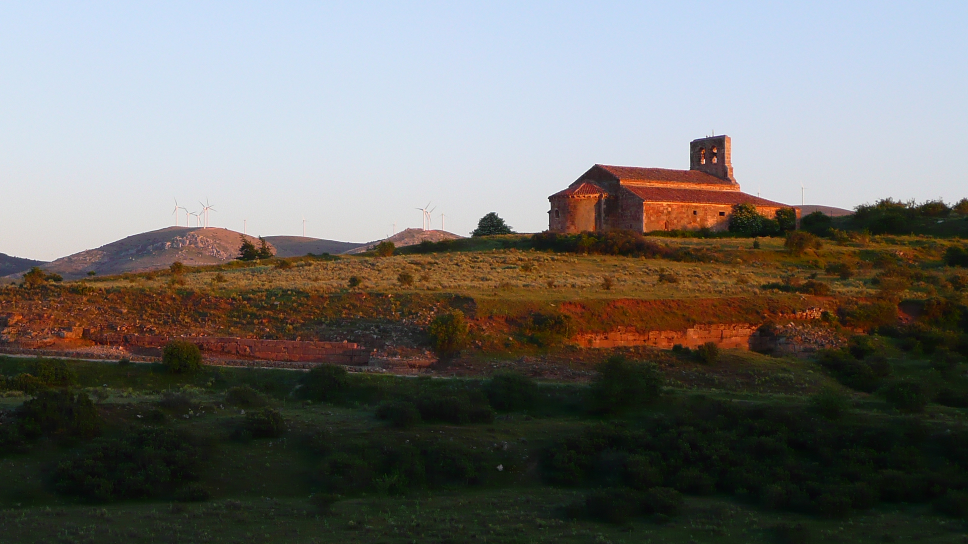 Amanecer en el yacimiento arqueológico de Tiermes, la ermita románica sobre fondo de molinos de viento modernos